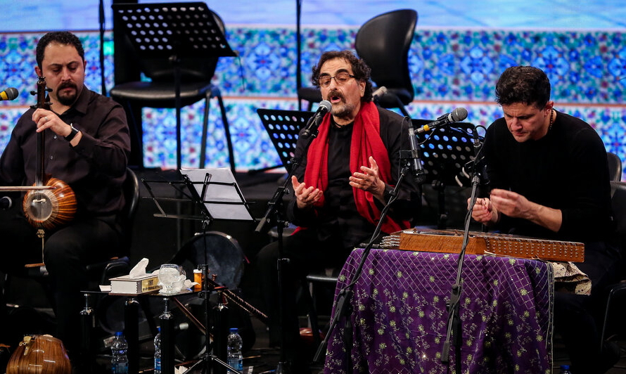 Shahram Nazeri & Pejman Taheri